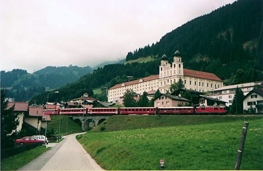 Der von einer Ge 4/4 II gezogene Glacier Express der Rhätischen Bahn in Disentis. Im Hintergrund zeigt sich die Benediktinerabtei St. Martin.